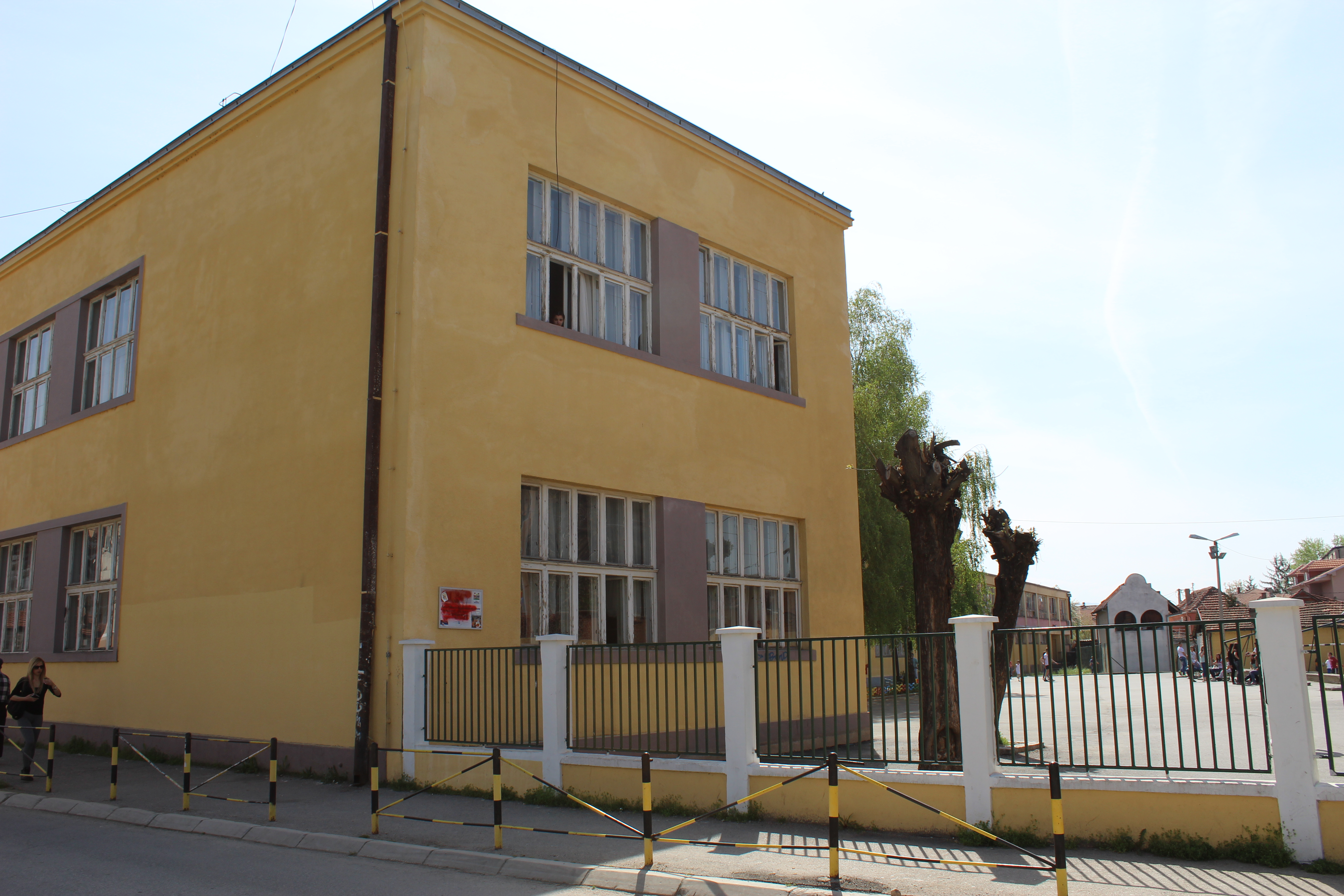 Osnovna škola Josif Kostić- Leskovac